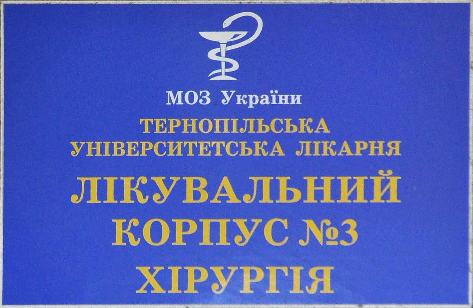 Вивіска лікувального корпусу № 3 Хірургія «Тернопільської університетської лікарні».